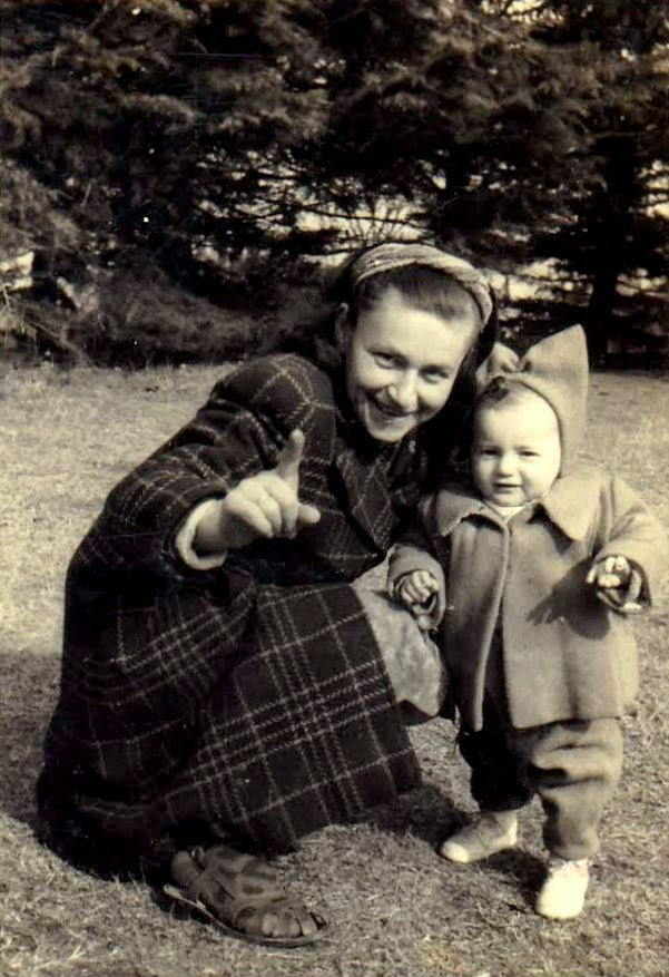 חיי היום יום